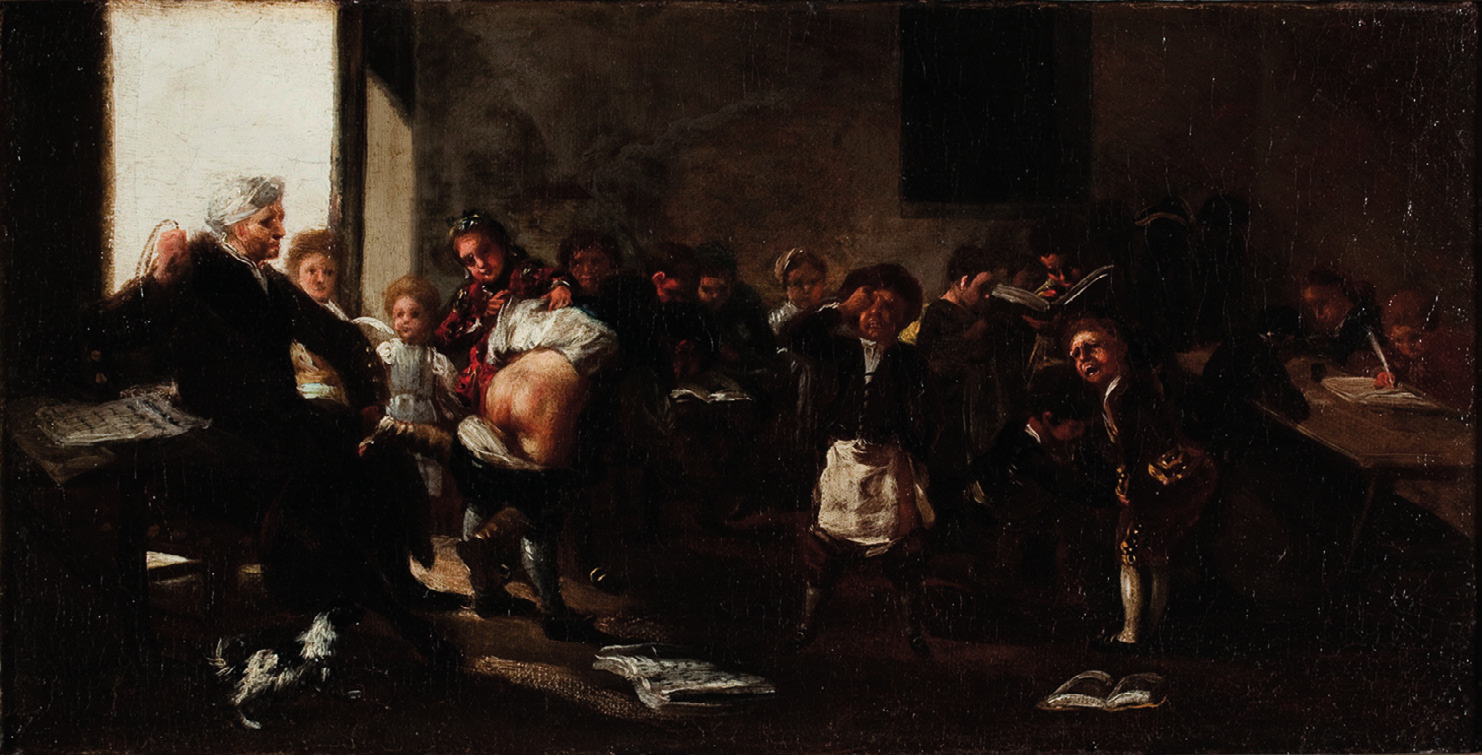 La obra representa una escena de escuela, en la que un maestro está en actitud de azotar con un latiguillo a un alumno que descubre las nalgas, y que adopta la postura para recibir el castigo. A la derecha, otros alumnos que ya han recibido la lección, recomponen sus ropas y en medio del llanto por el castigo recibido, mientras que en el fondo a la derecha de la escena, la sombra del cuadro envuelve a otros niños que se aplican a sus tareas